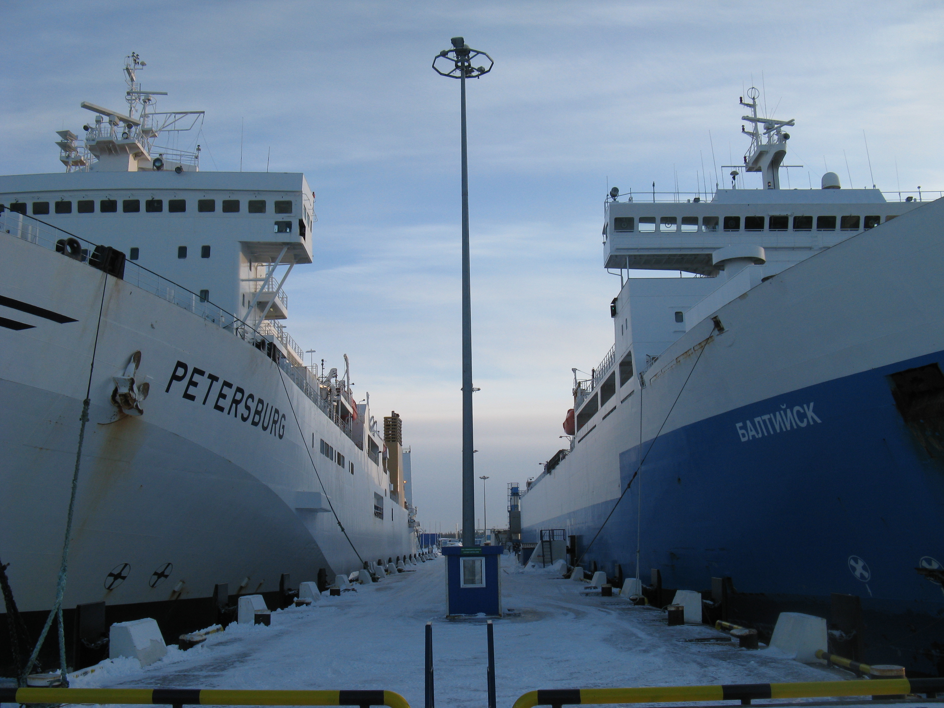 Паромы "Балтийск" и "Петербург" на АЖПК Усть-Луга